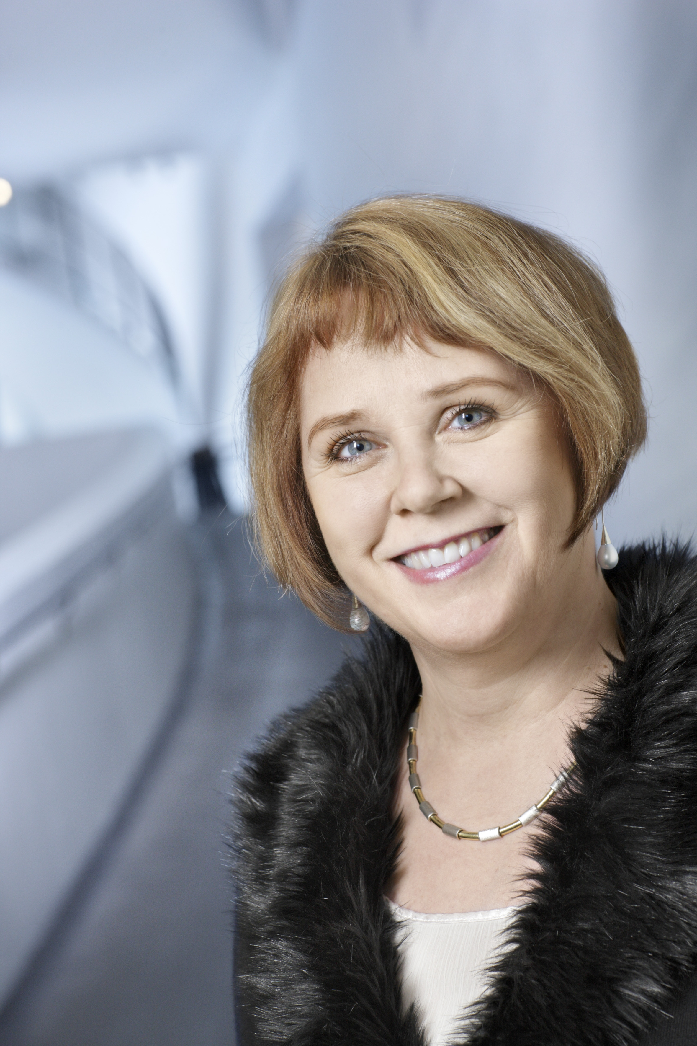 Katrina Harjuhahto-Madetoja